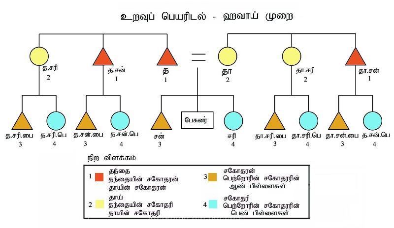 Drawn by the user who uploaded it here.